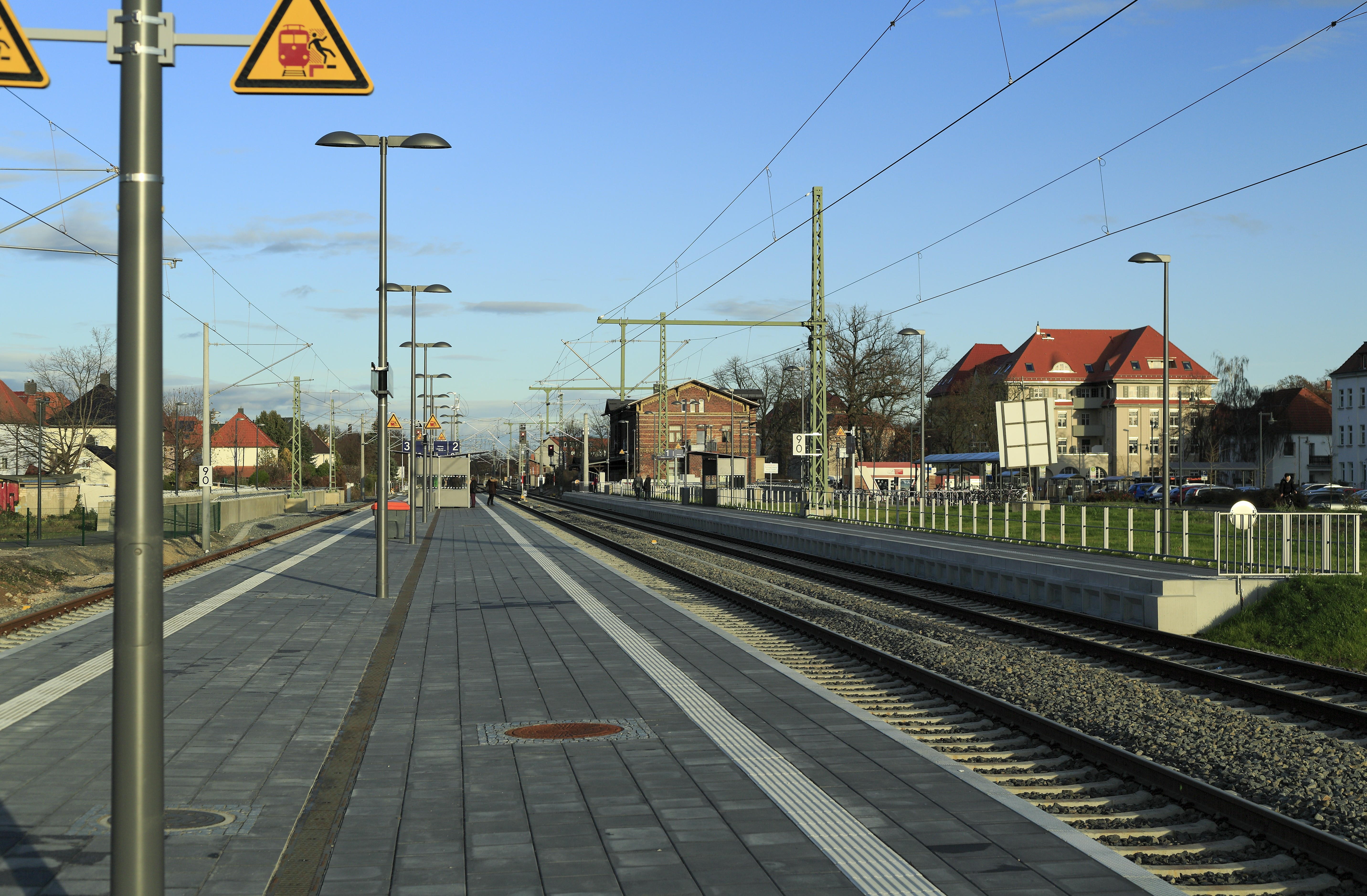 Richtung Jesewitz und Eilenburg, die Reiseverkehrsanlagen sinder nach langen Verzögerungen und einer fast ebenso langen Bauzeit in Betrieb. Die Baustellenabsperrungen sind entfernt, die Anlagen sind ungewöhnlich sauber. Planmäßig wird das Gleis 3 noch nicht befahren, das ändert sich erst mit dem Fahrplanwechsel am 15. Dezember 2019.